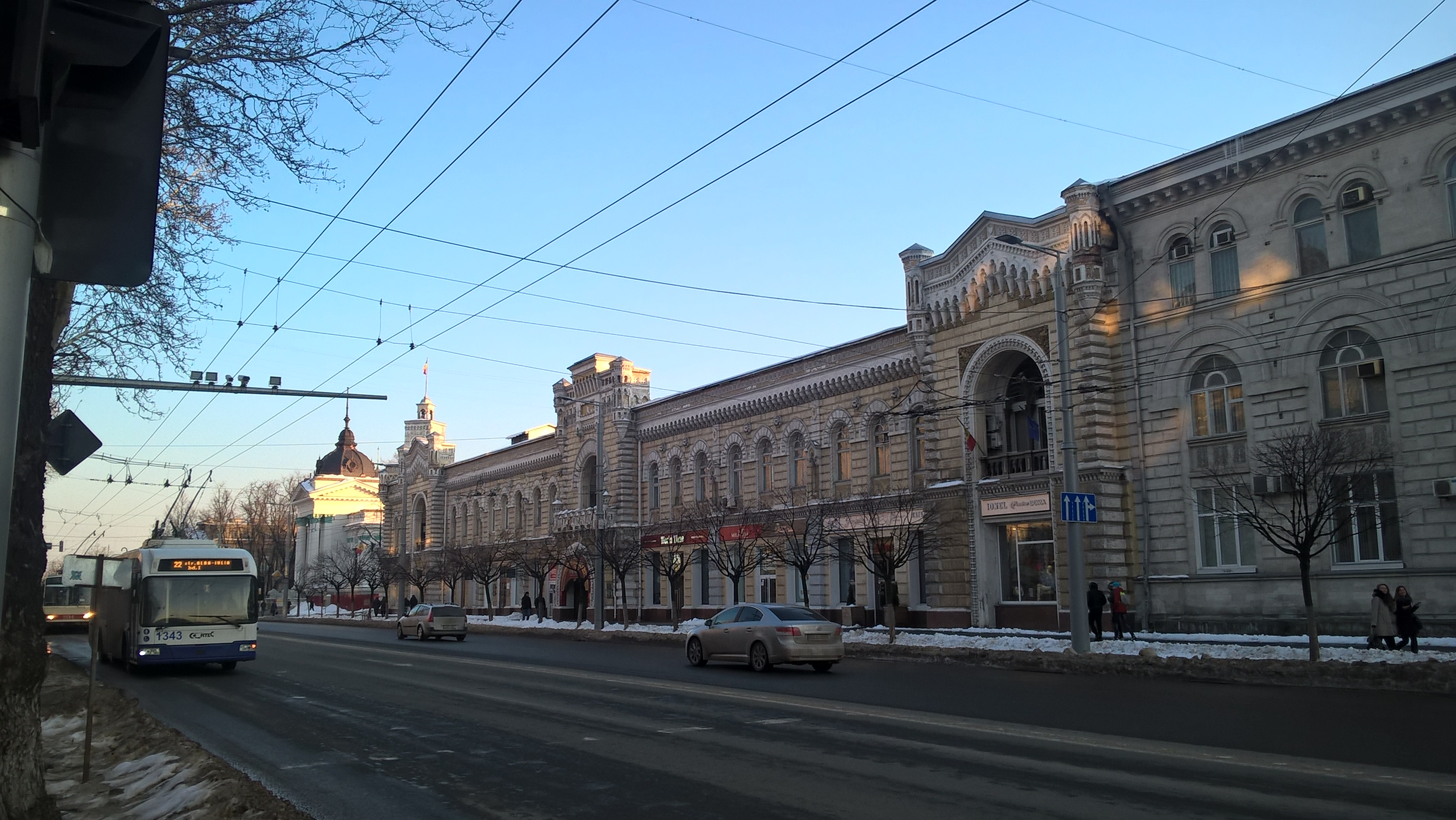 Ratusz w Kiszyniowie